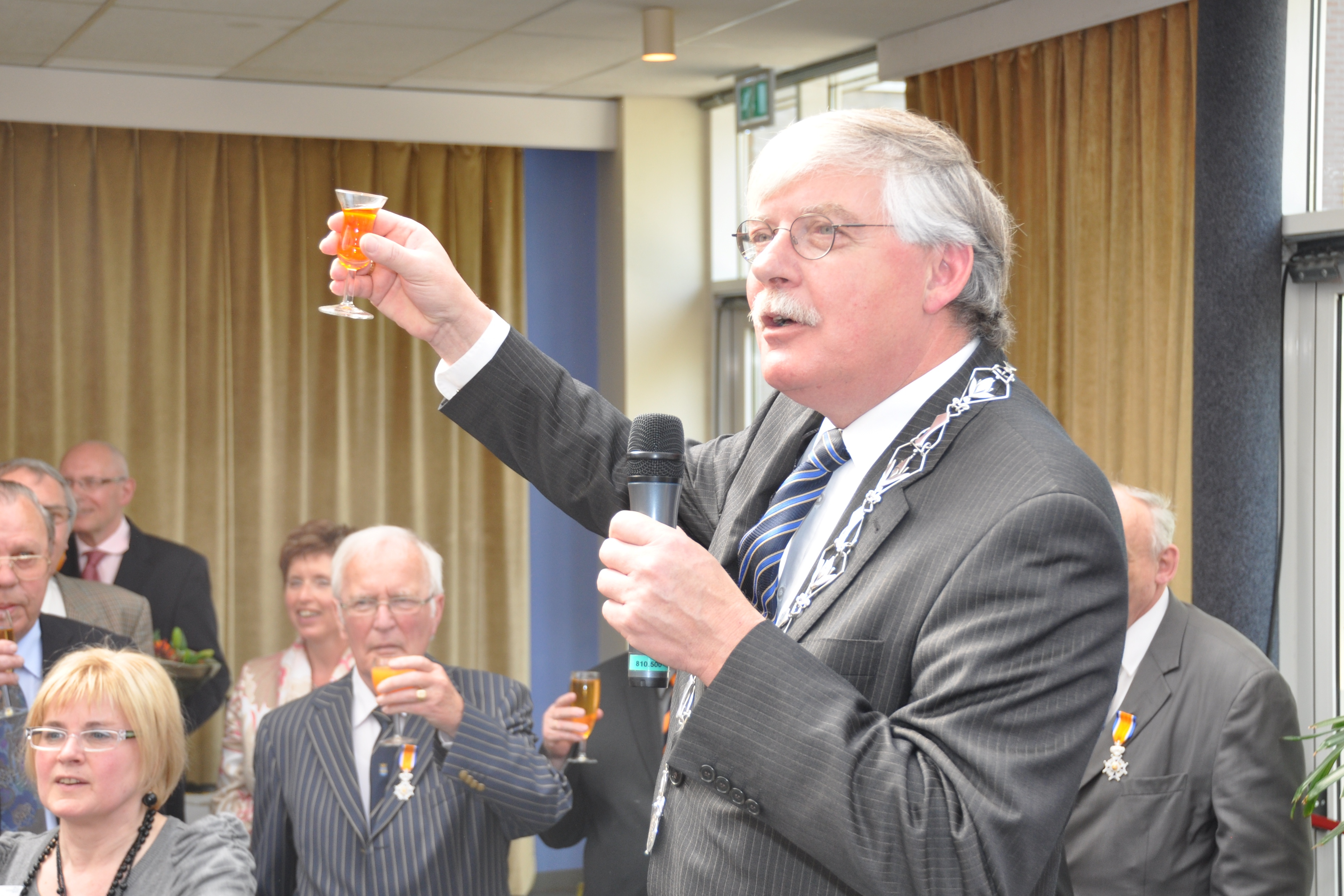 Cees van der Knaap bij de uitreiking van de Koninklijke onderscheidingen, de lintjesregen van 2010, in de Reehorst